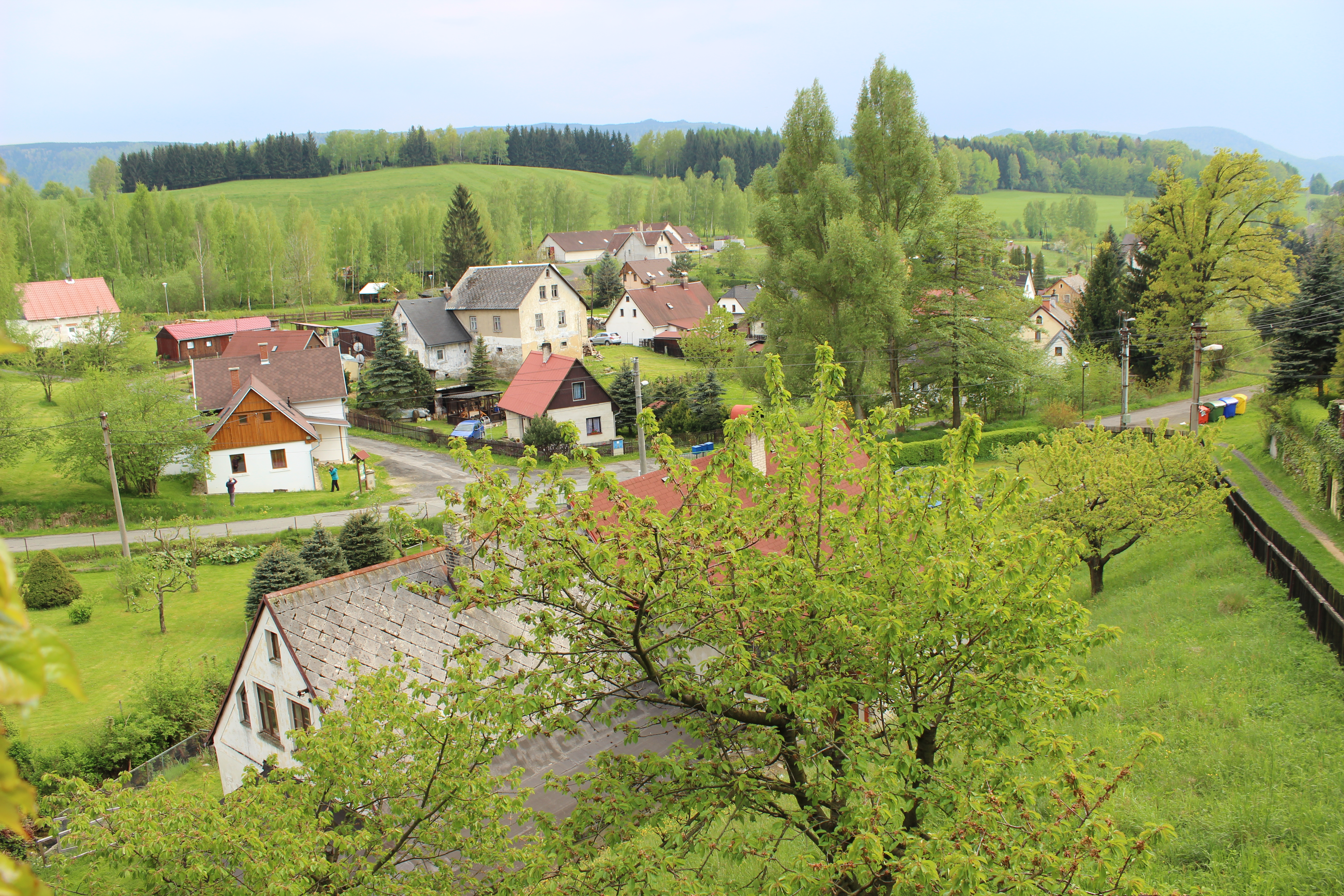 Zástavba v horní části obce Lázně Libverda.